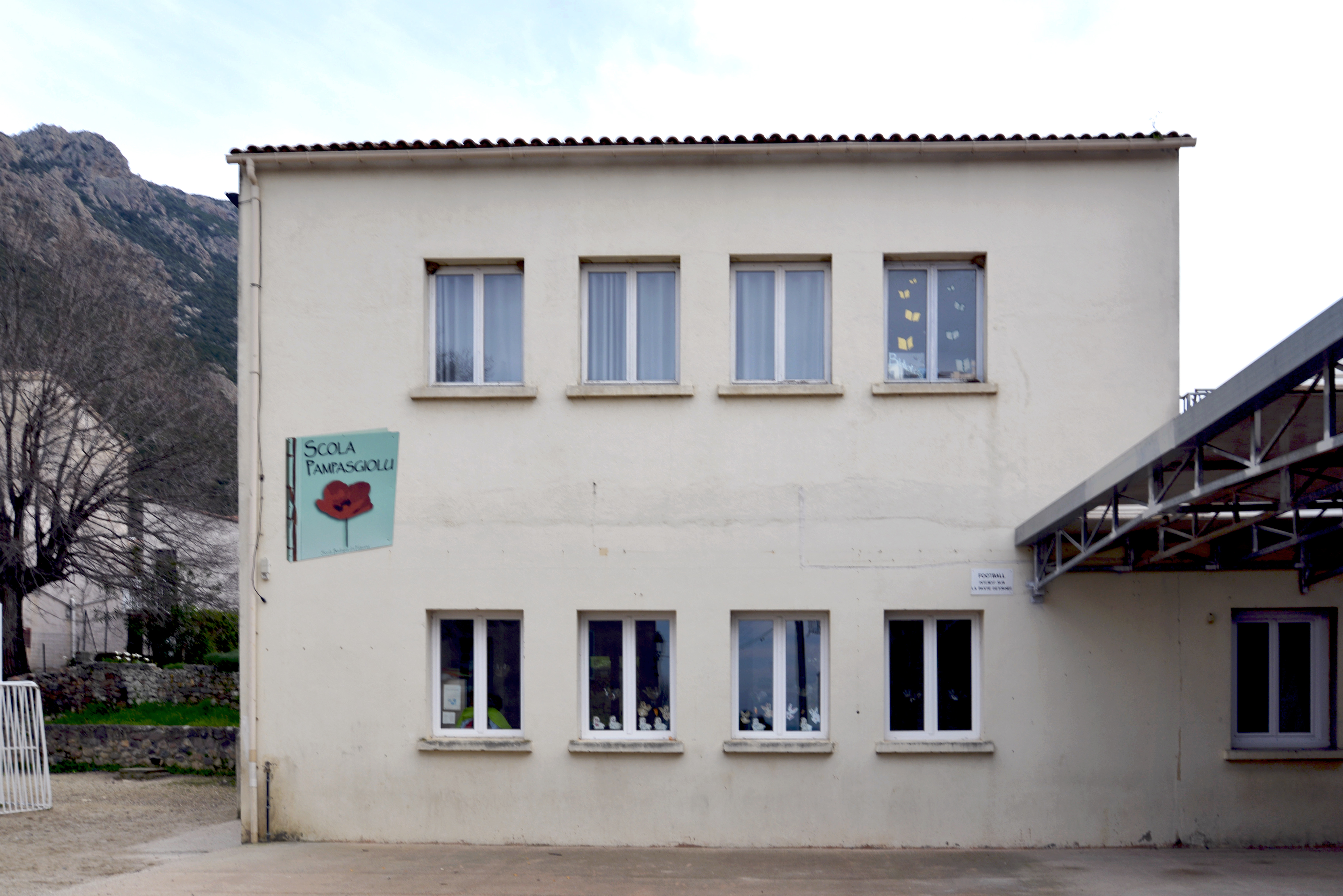 Galéria, Filosorma (Haute-Corse) - L'école primaire Scola Pampasgiolu au cœur du village